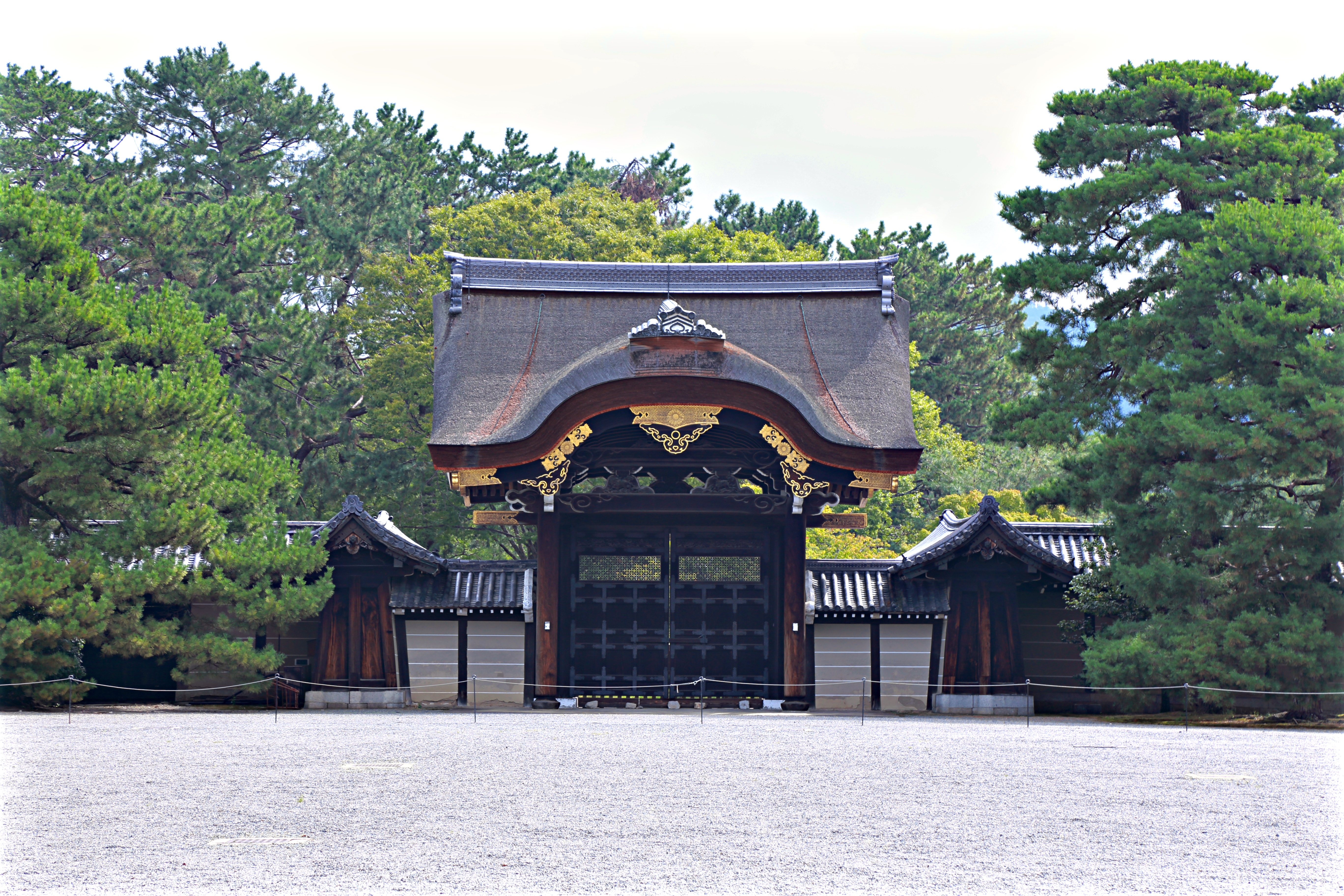 日本京都御所的东侧大门，建春门。内视角